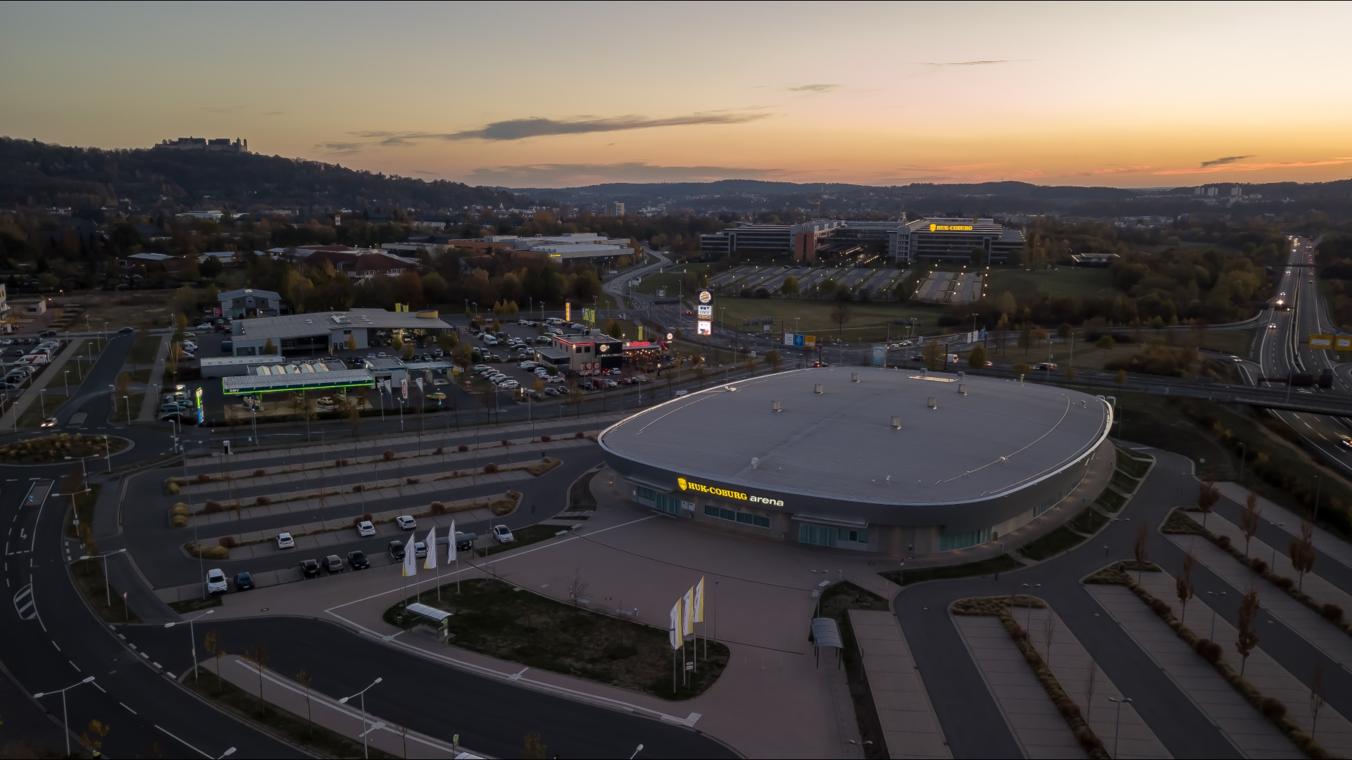 HUK Coburg arena im Herbst 2018.